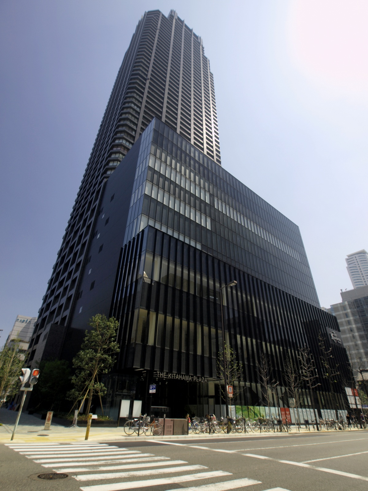 The Kitahama (The Kitahama Tower & Plaza) 所在地：大阪府大阪市中央区